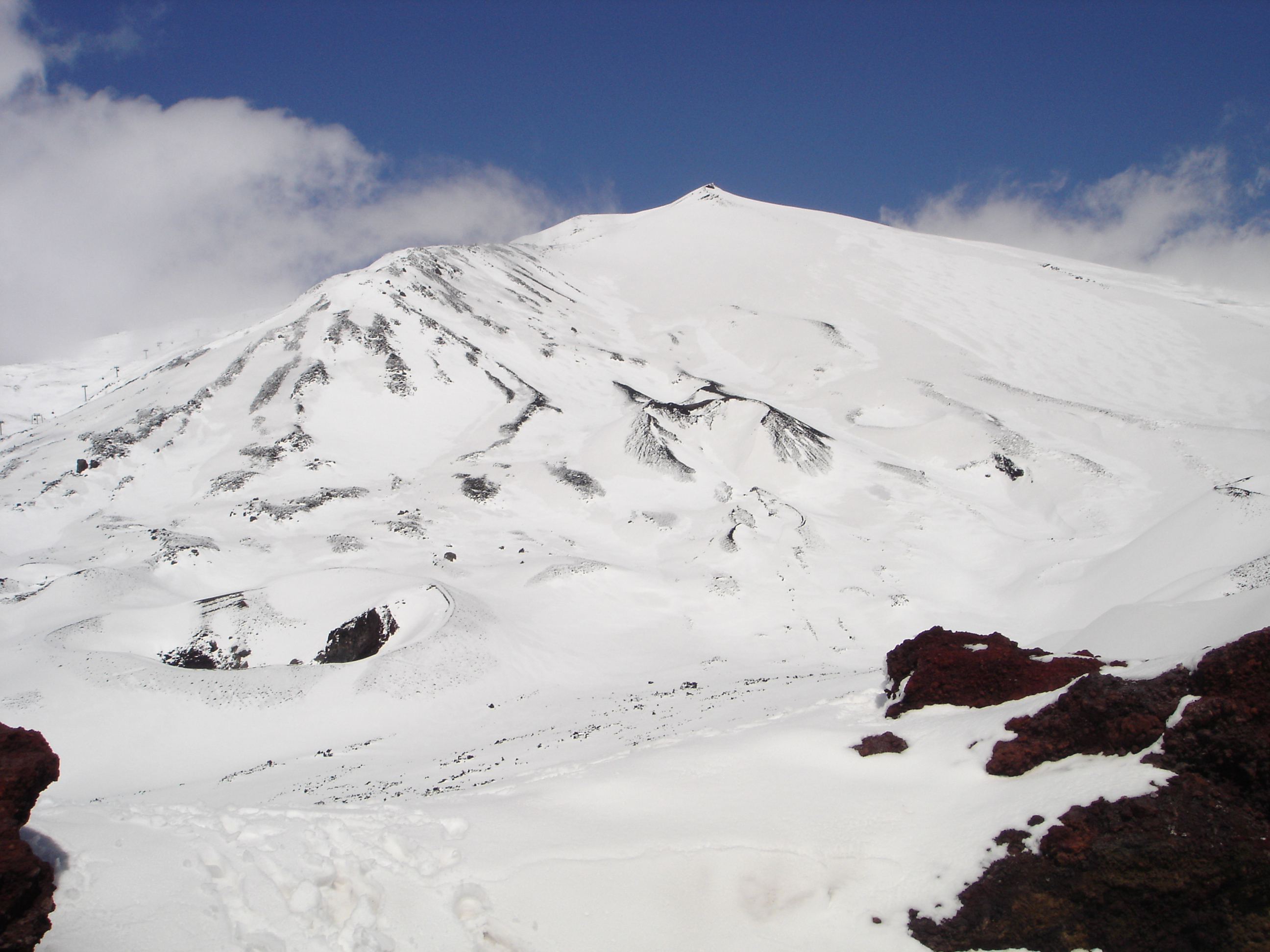 Etna au départ du refugio di sapienza